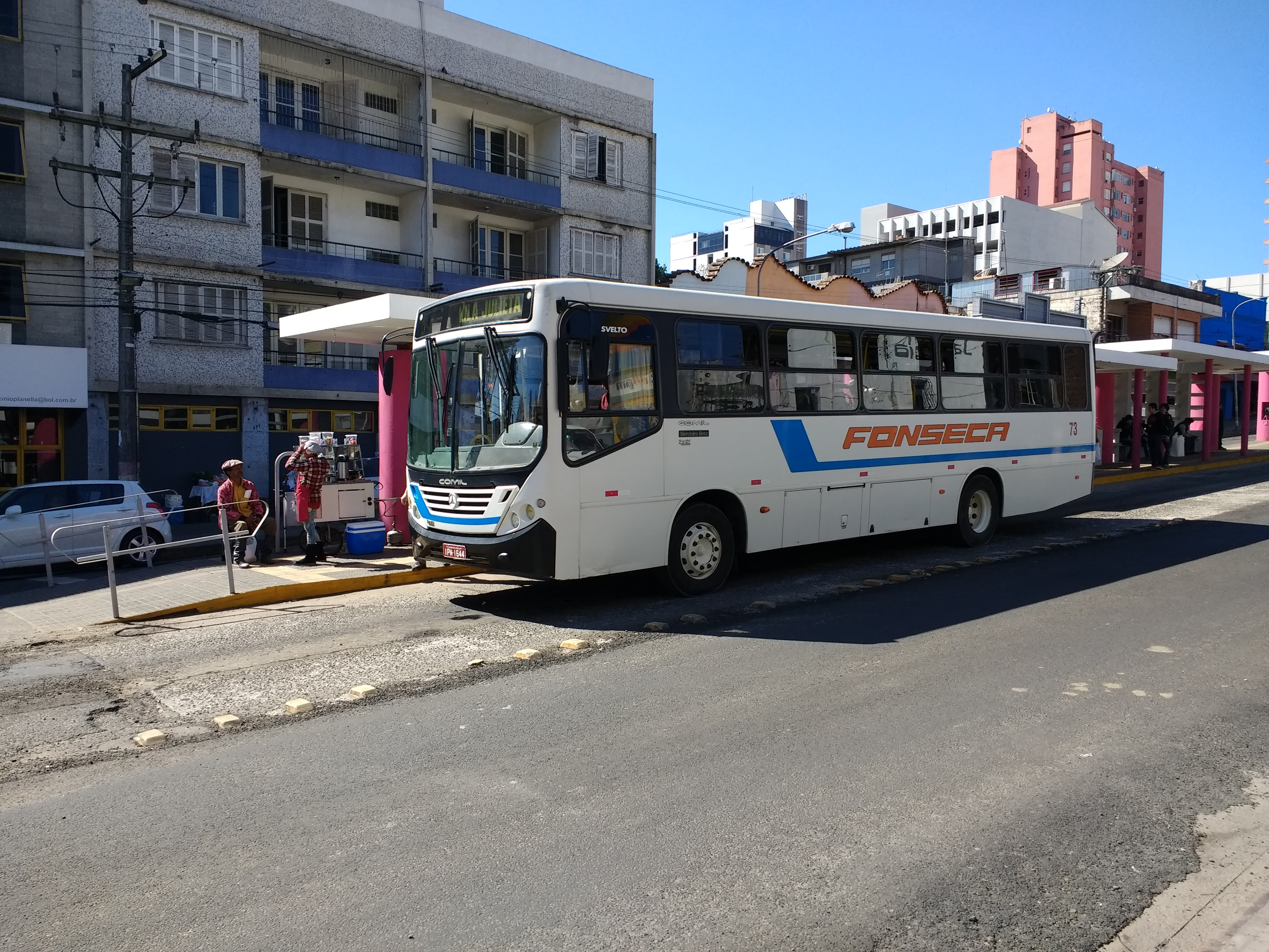 A bus in Santana do Livramento, Brazil.